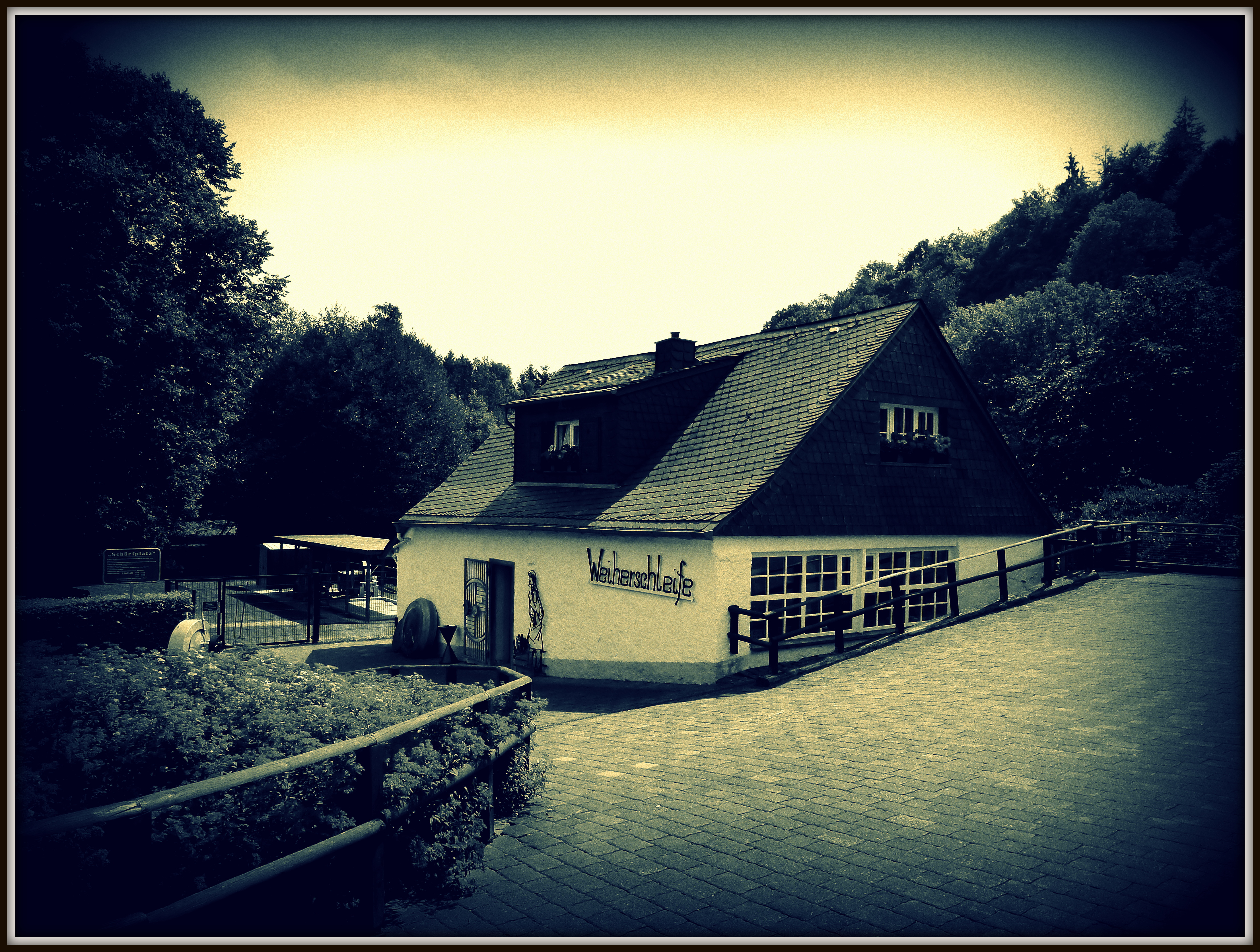 Idar-Oberstein – Die Historische Weiherschleife oder auch Kallwiesweiherschleife war von 1754 bis 1945 in Betrieb